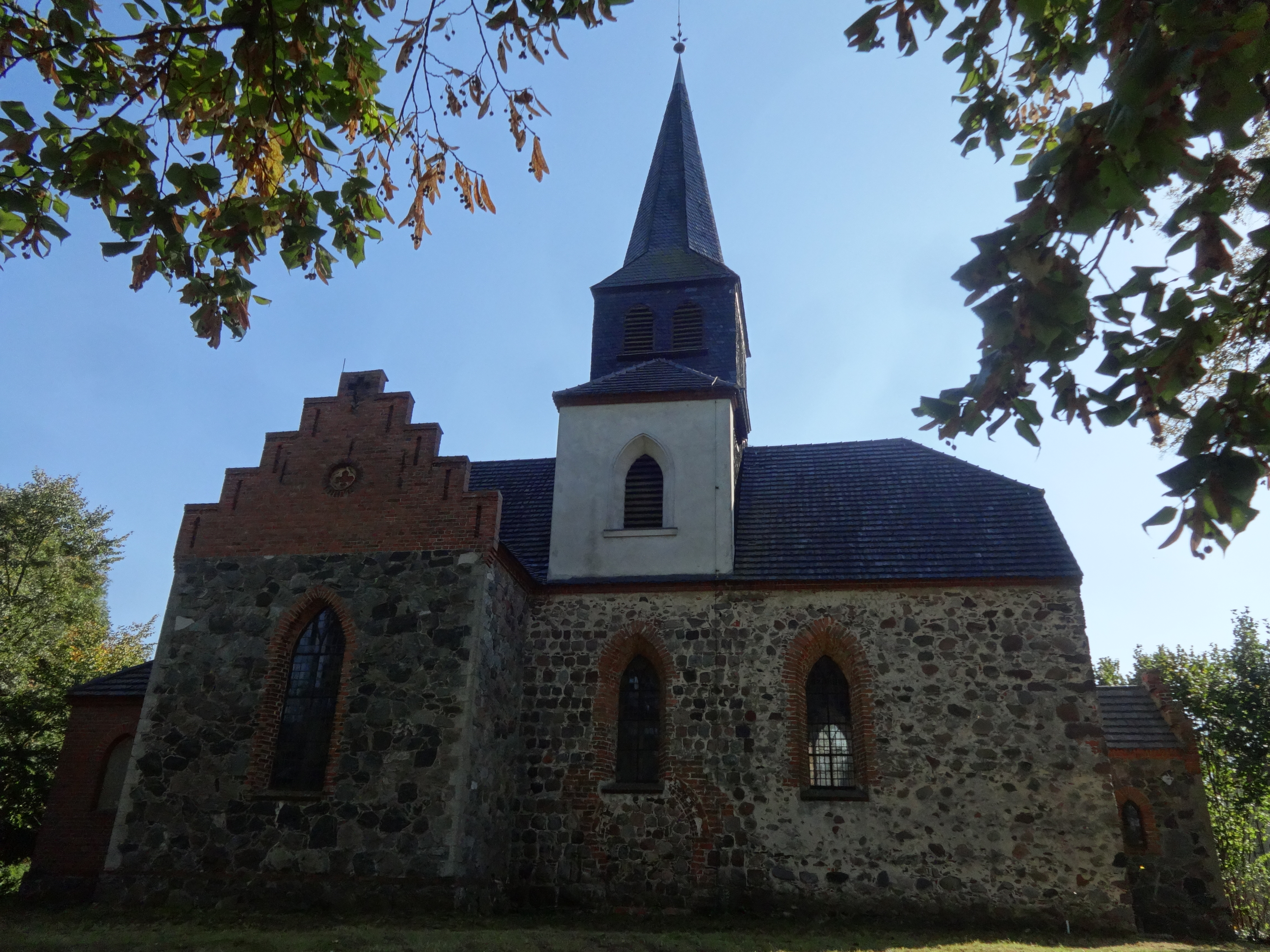 Die Dorfkirche Sauen ist ein mittelalterlicher Feldsteinbau in der Gemeinde Rietz-Neuendorf im Landkreis Oder-Spree in Brandenburg, der 1896 überformt wurde. Im Innern befinden sich eine Westempore sowie eine Holzdecke aus der Zeit des Umbaus.